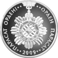 Памятная монета Республики Казахстан «Орден Парасат» из серии «Награды Казахстана» - 50 тенге - реверс